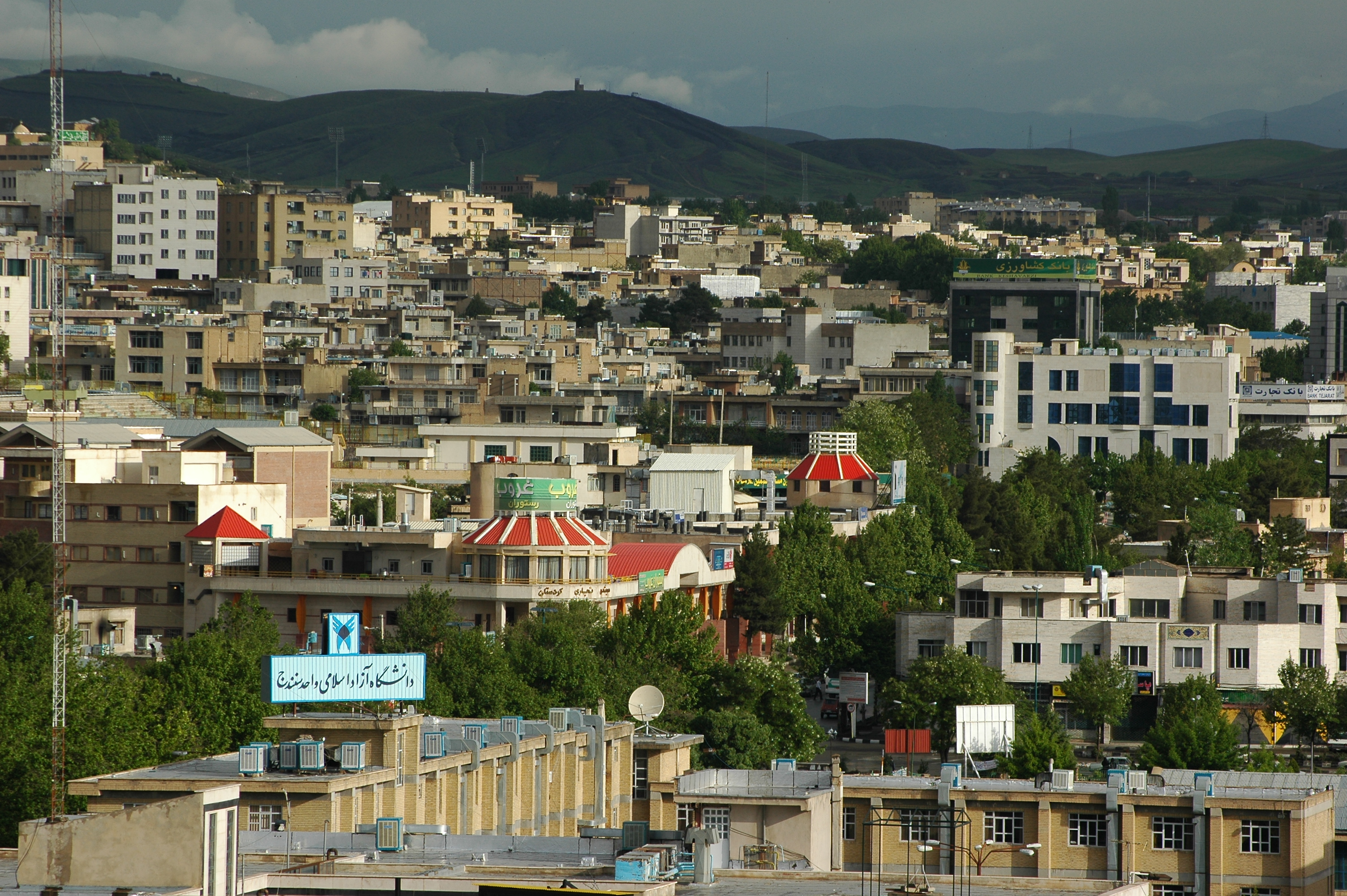 view on Sanandaj, Kordestan, Iran